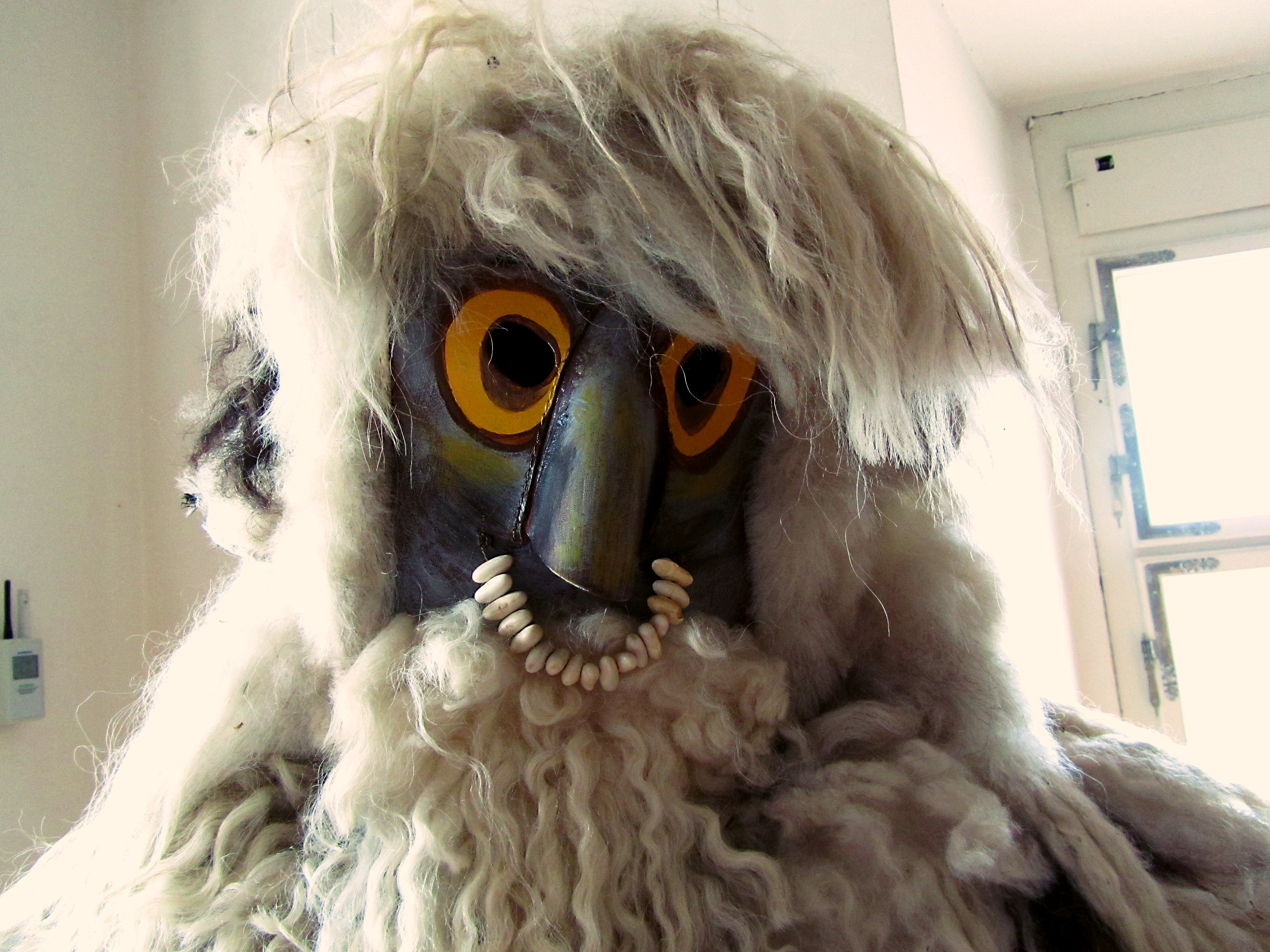 Korant head, Ptuj, Slovenia